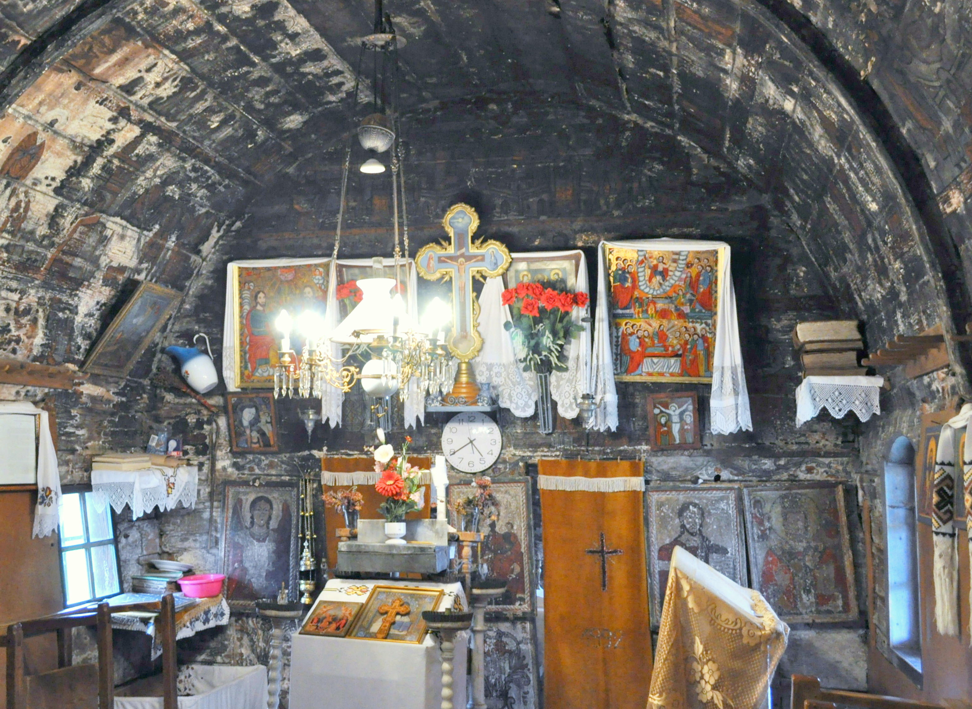 Biserica de lemn din Straja, comuna Căpușu Mare, județul Cluj